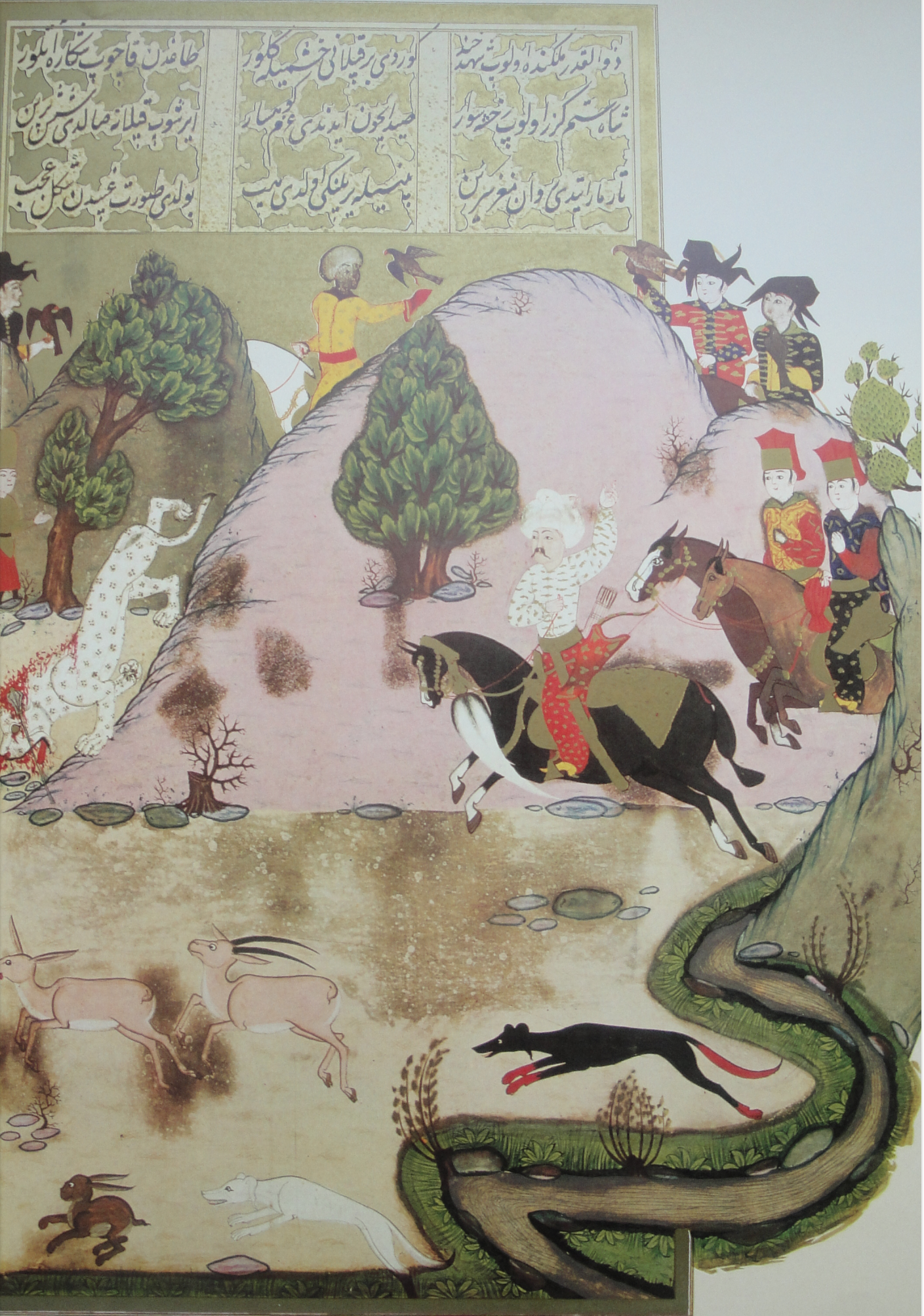 “Yavuz Sultan Selim’in Dulkadir Hükümdarı Alaüddevle’ye karşı seferi sırasında Küskün Deresi kenarında otağ kurduğu yerde kaplan avlaması.”